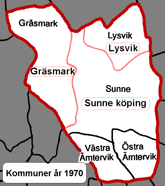 Kommuner